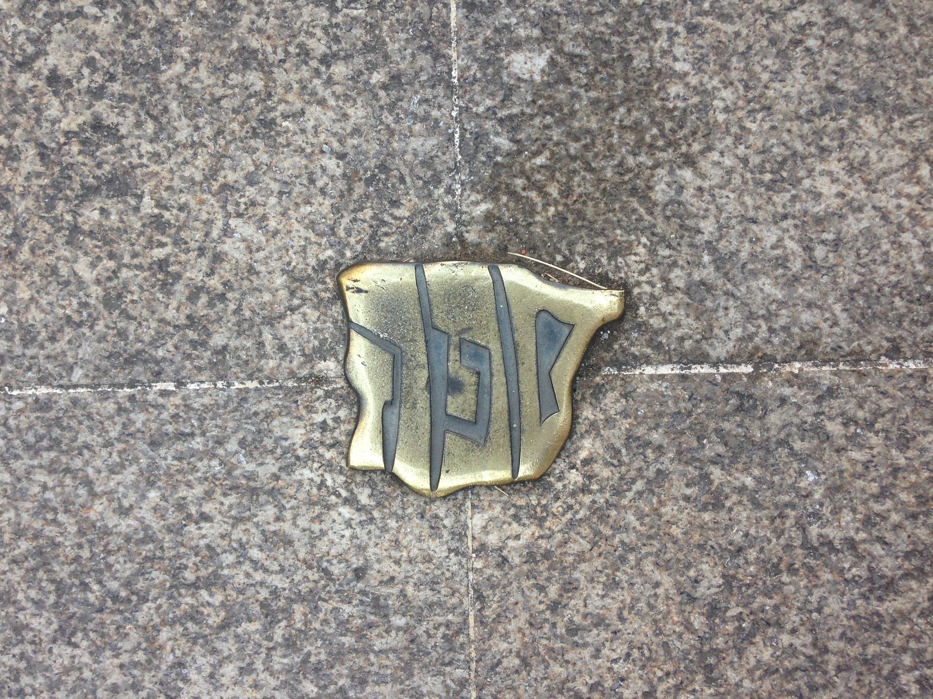 Selo da Red de Juderías de España na confluencia das rúas Peixaría e Cárcere Vello, en Monforte de Lemos.